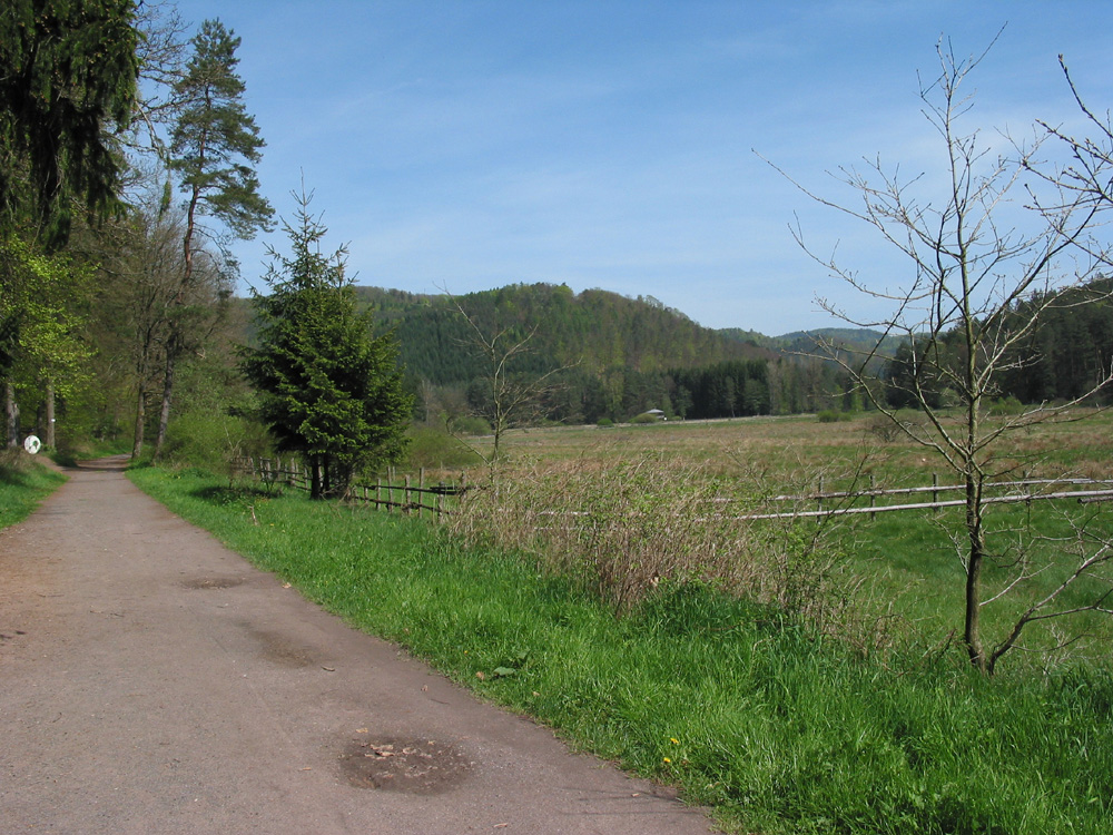 Description: Biosphären-Erlebnisweg Source: Selbst fotografiert, 30.04.2005 in Fischbach Photographer/Painter: Ralf Ziegler, --RalfZi 18:06, 3 May 2005 (UTC)